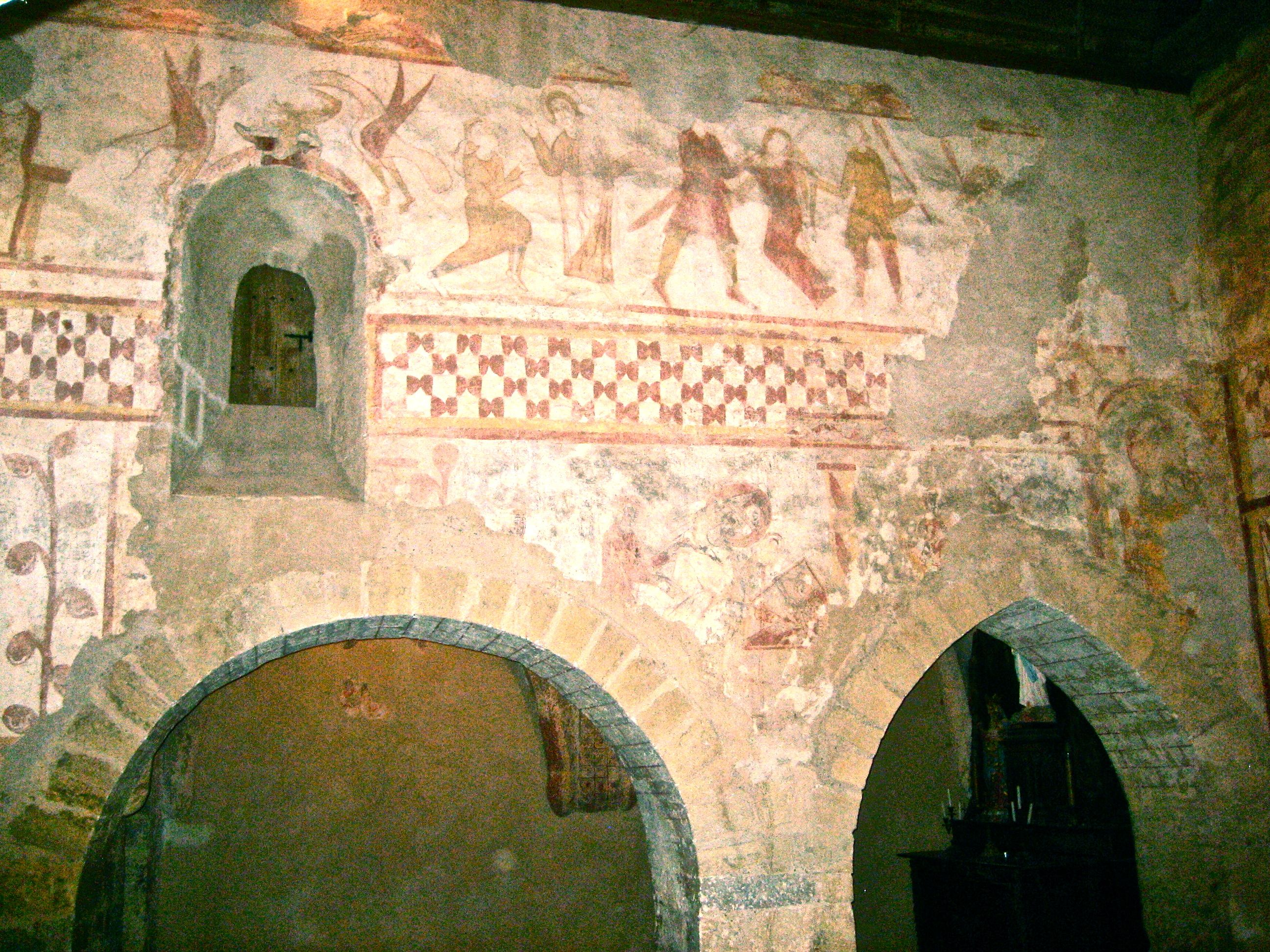 Église Saint-Laurent de Lourouer Saint-Laurent: disposition des fresques du nord